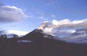 Ascheausbruch am Tungurahua in Ecuador